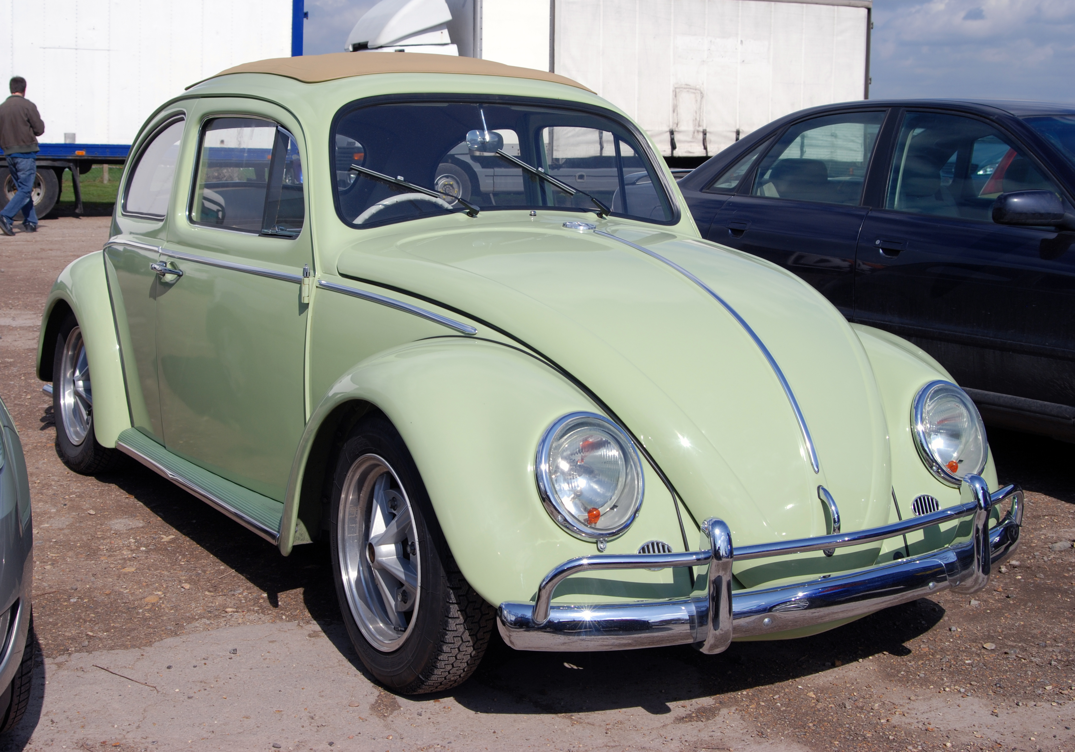 Volksworld,Mar 2009